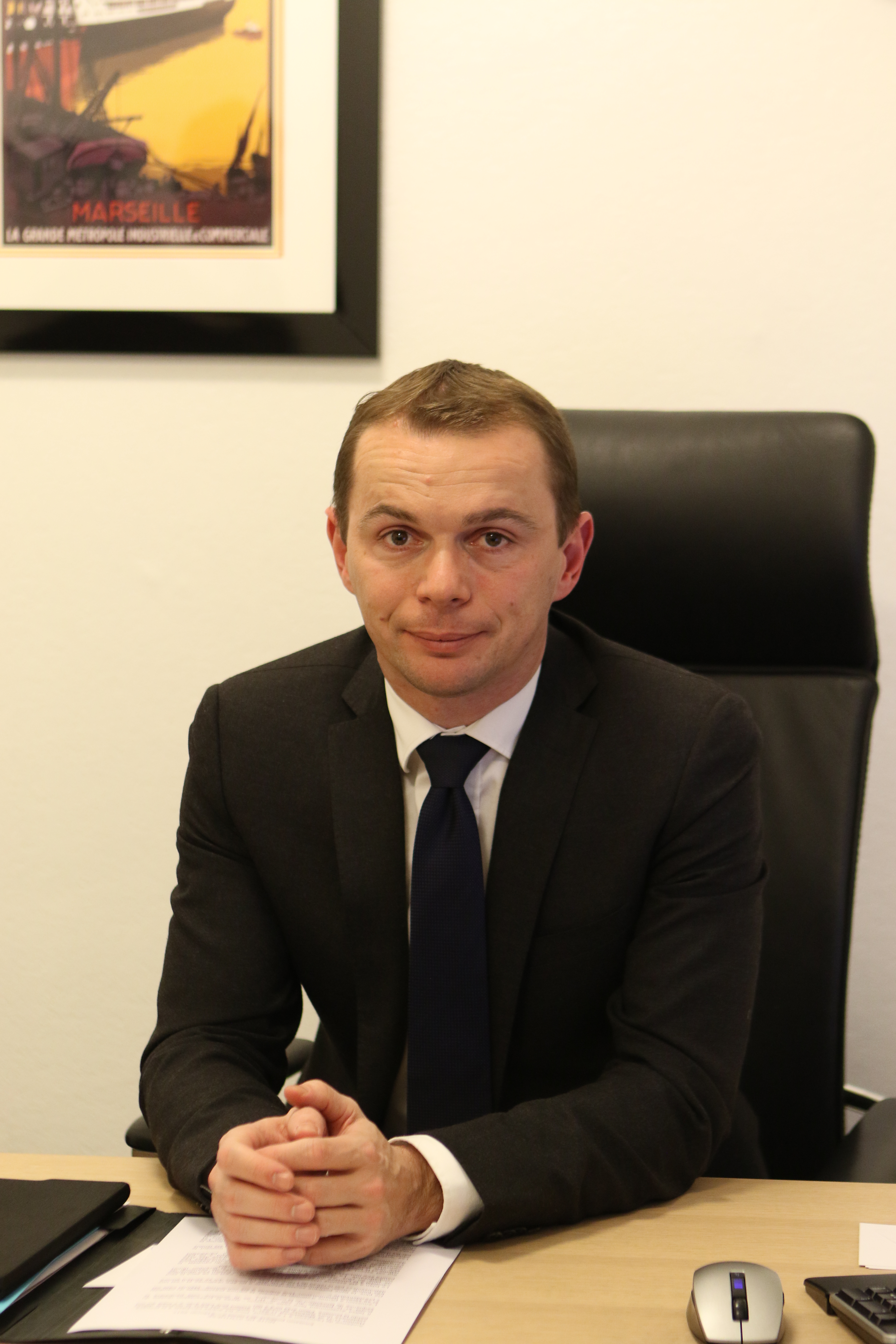 Olivier Dussopt Député de la 2ᵉ circonscription de l'Ardèche